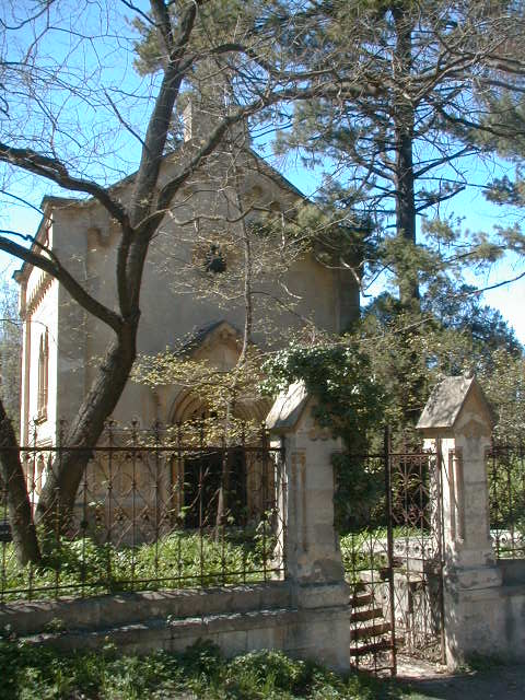 A Bethlen család iktári ágának kriptája Kolozsvárott, a Házsongárdi temetőben. Lásd a családfát: [1]